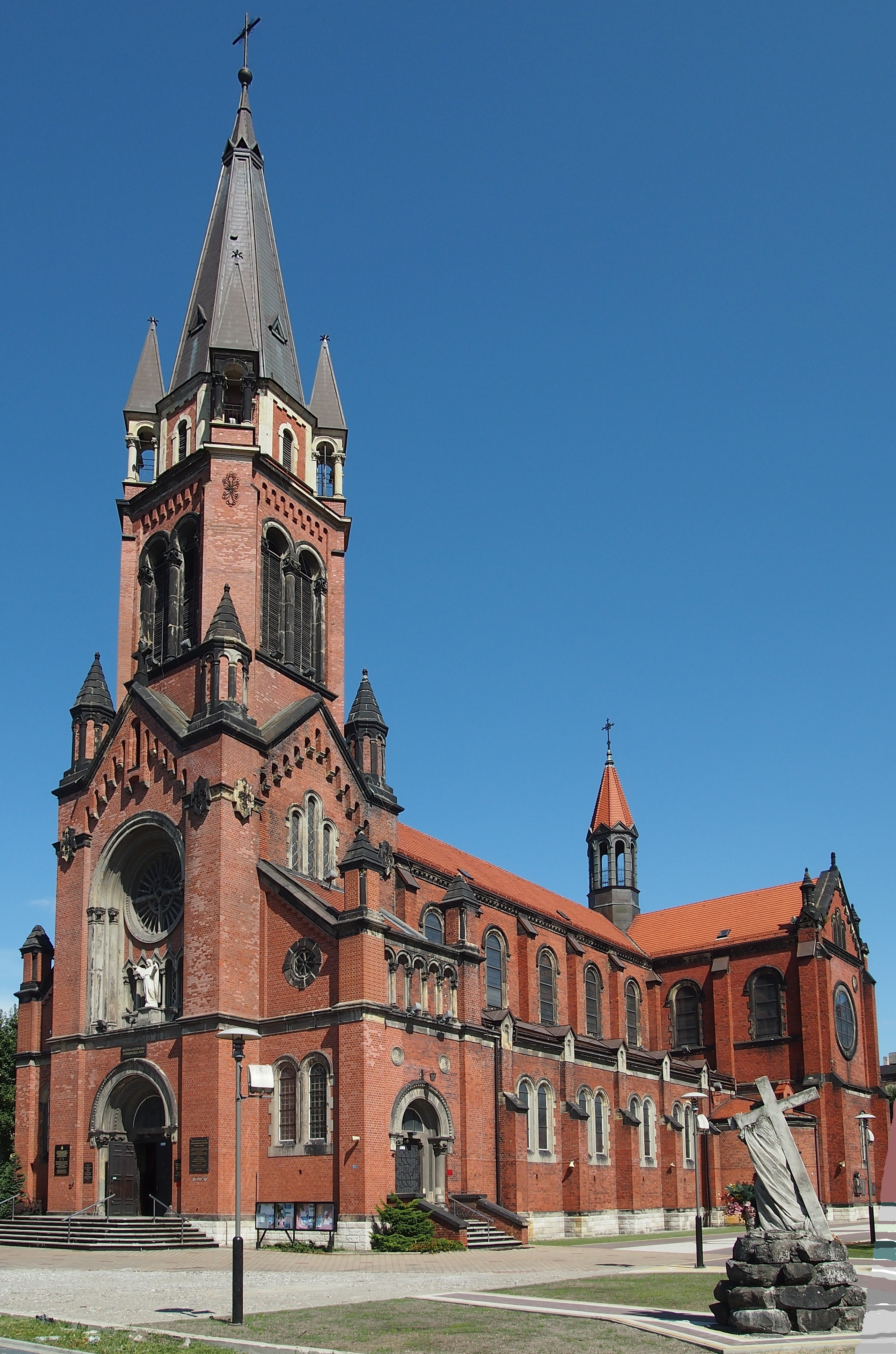 Kościół Wniebowzięcia NMP w Sosnowcu przy ulicy Kościelnej